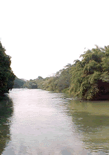 Rio Jaguari, entre Paulínia e Cosmópolis.